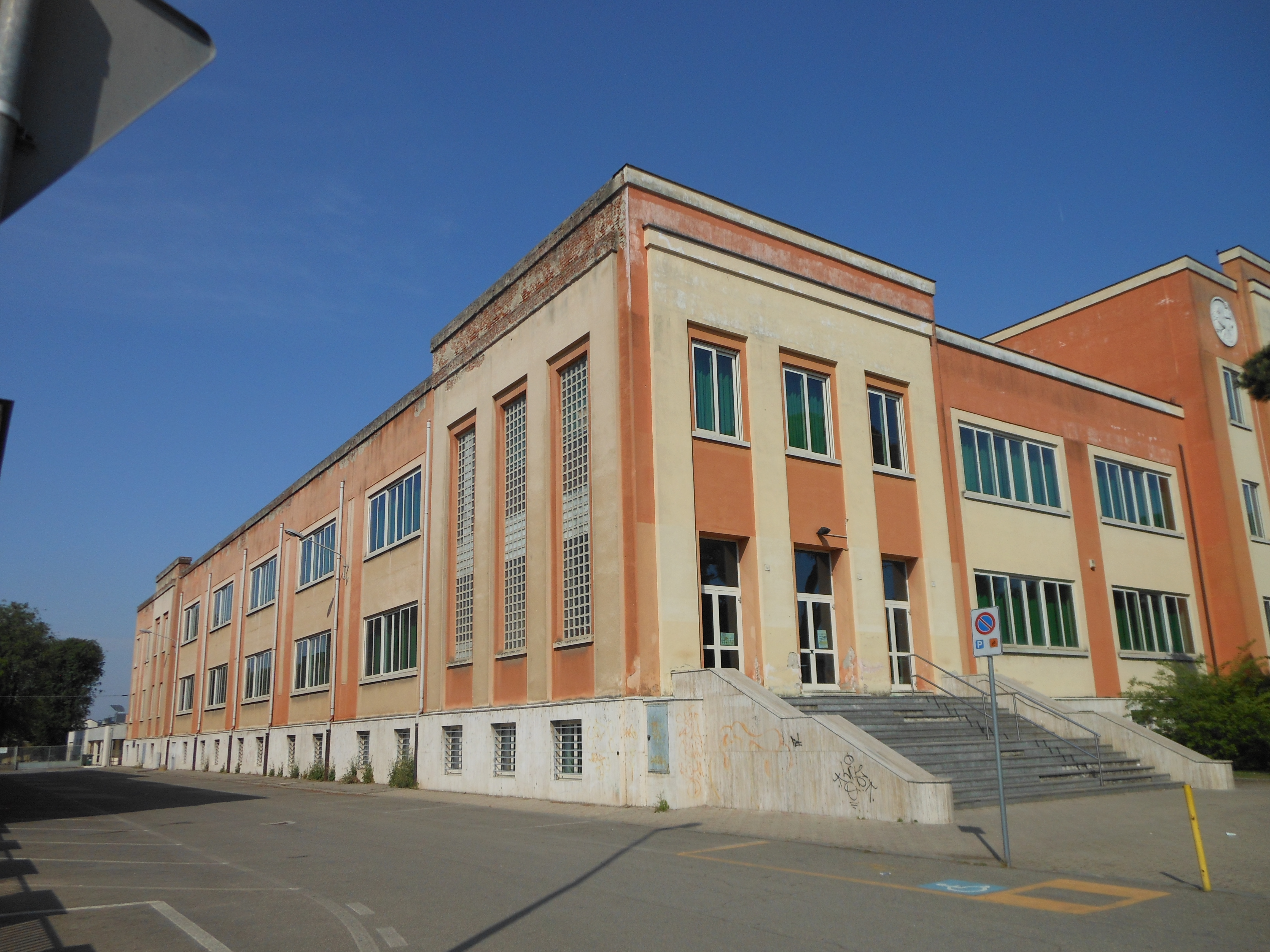 Scuola elementare Mortara - ala sud